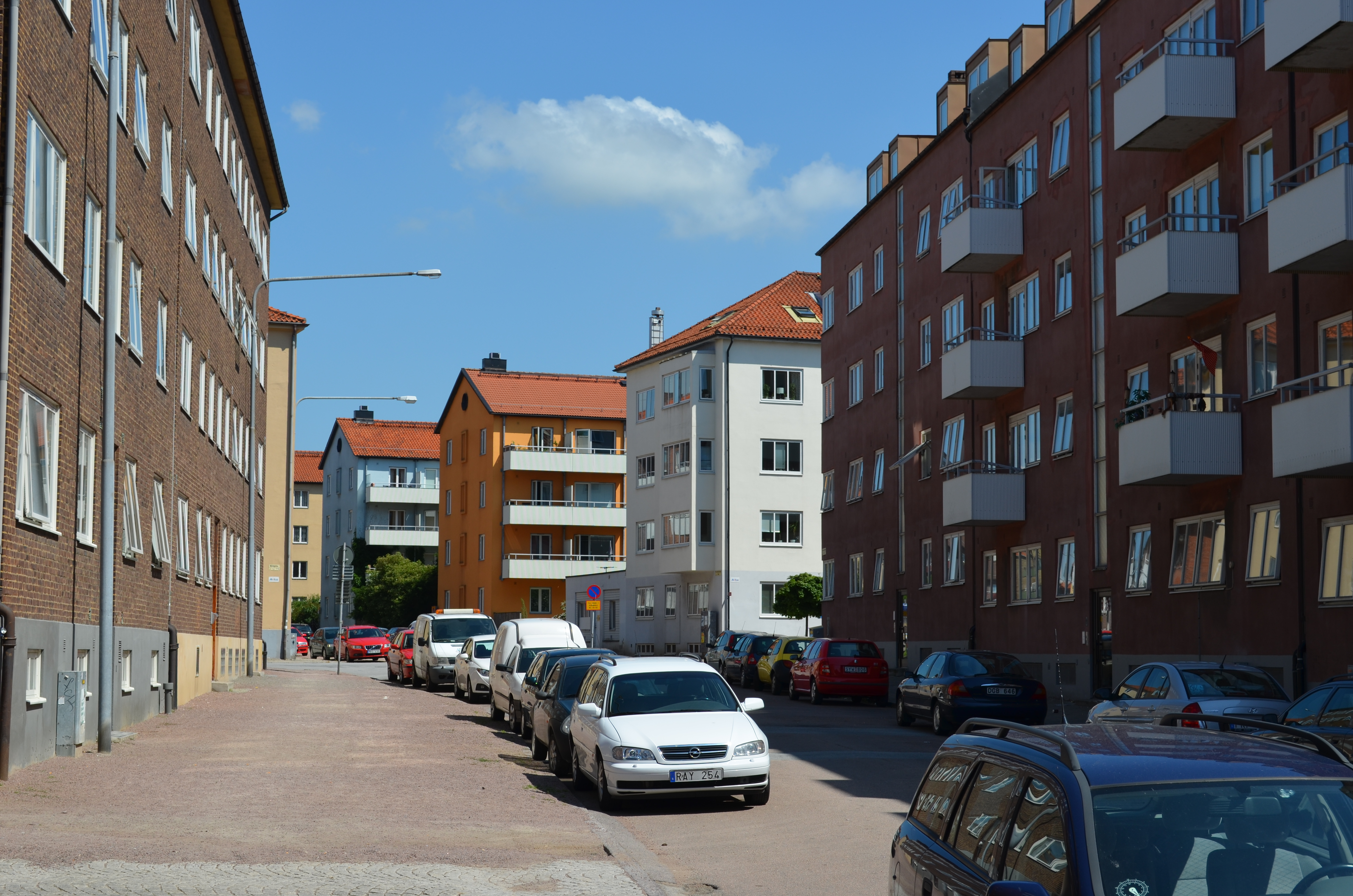 Övre Eneborgsvägen i Helsingborg